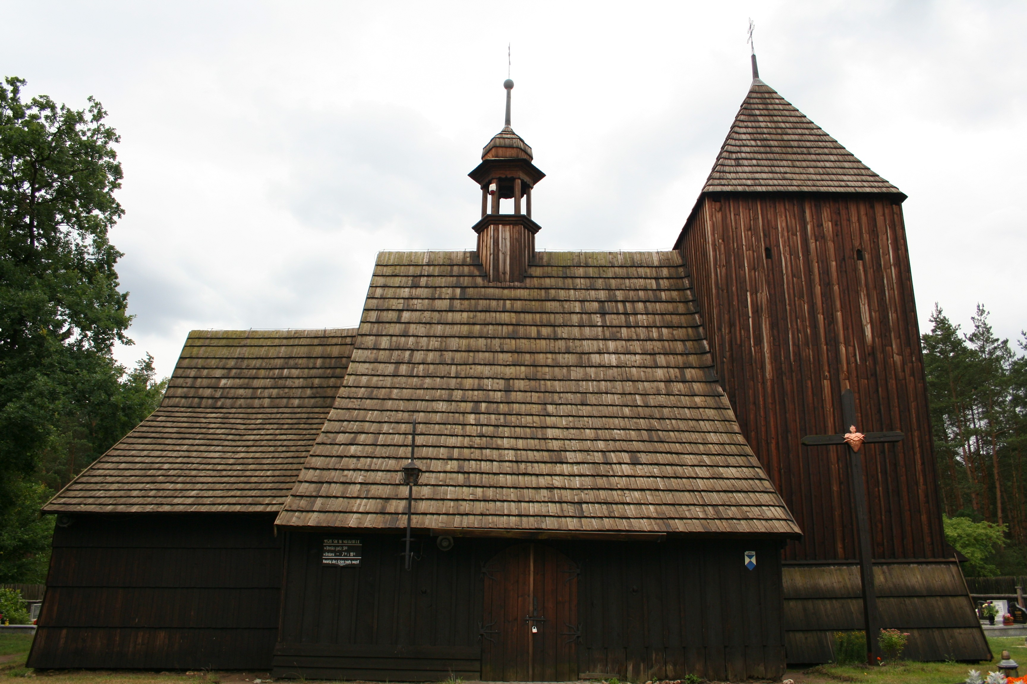 kościół Jana Chrzciciela w Bruśku, powiat lubliniecki